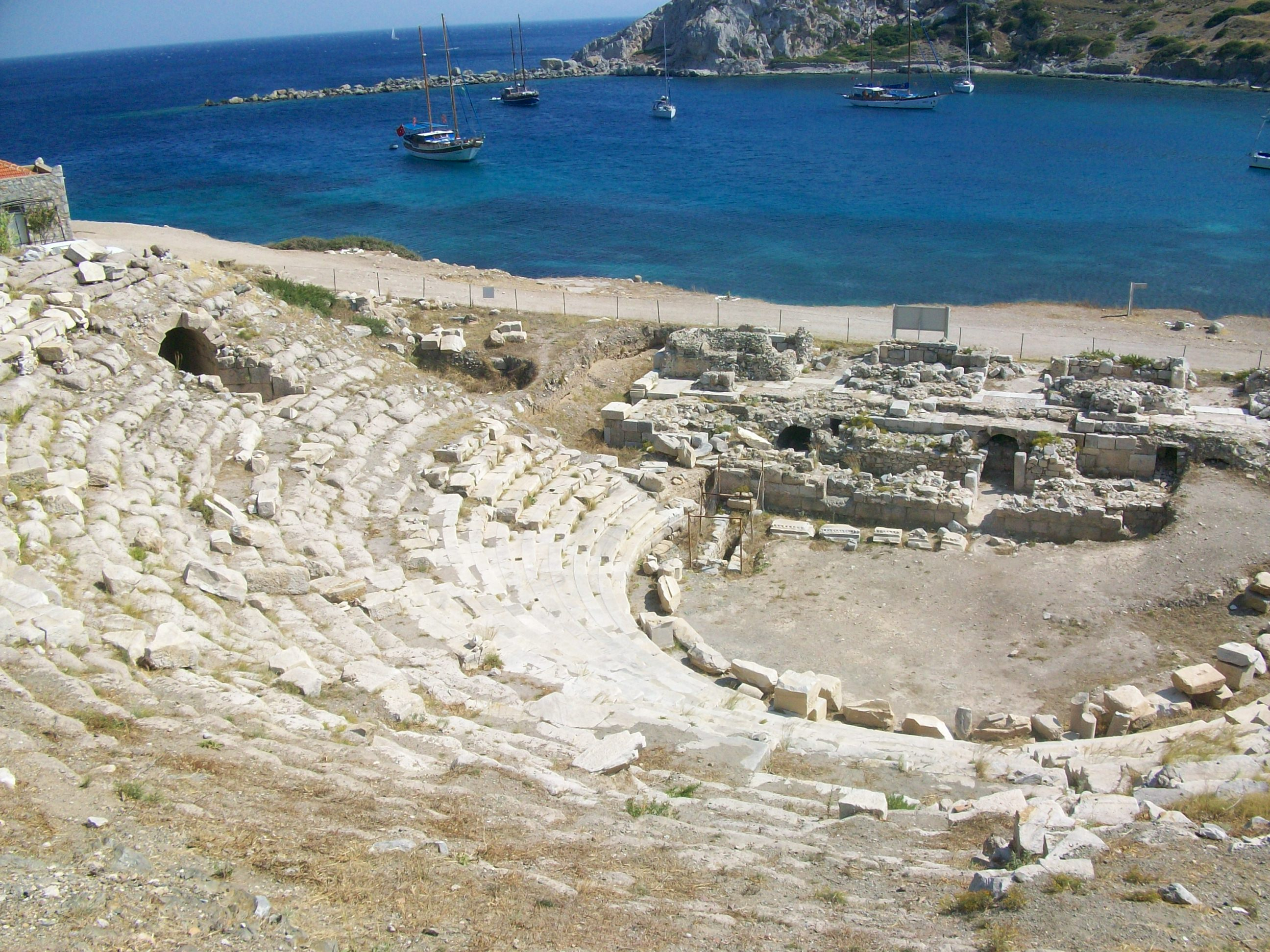 Muğla ili Datça ilçesinde bulunan antik kent Knidos'ta antik tiyatro.